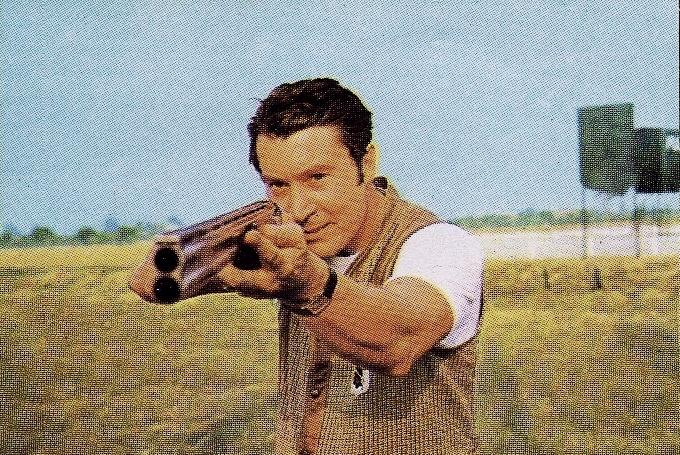 Michel Carrega aux Jeux Olympiques de 1972 à Munich.